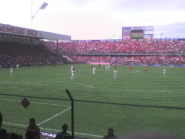 Estadio Nemesio Diez, Toluca vs. Guadalajara